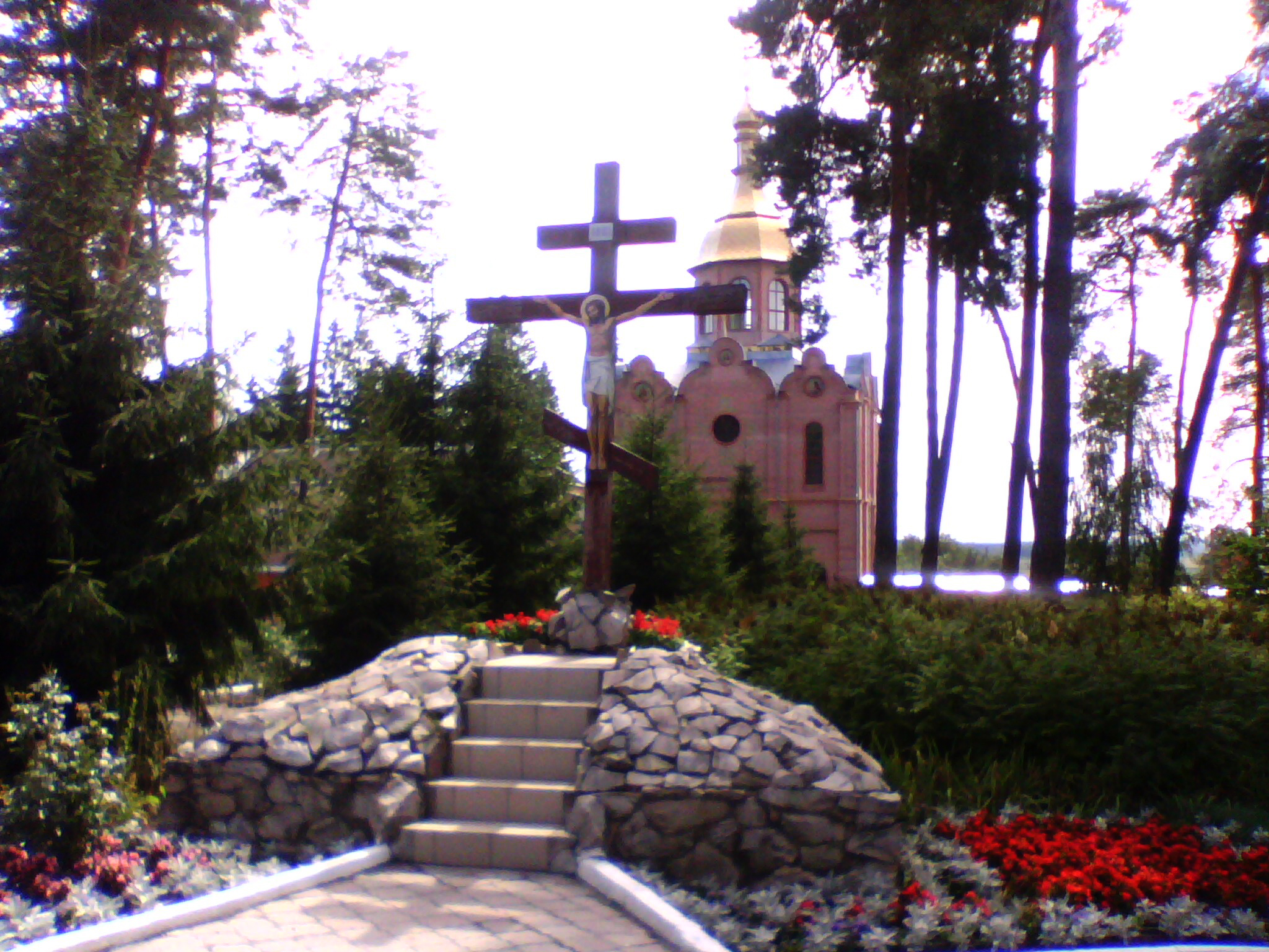 Глынская Пустынь